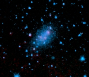 UGC 5423, M81 dwarf B